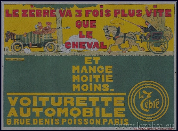 Publicité automobiles le Zèbre rue Denis-Poisson Paris XVII (1912)